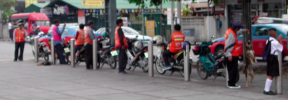 Waerth 30 aug 2004 23:30 (CEST)